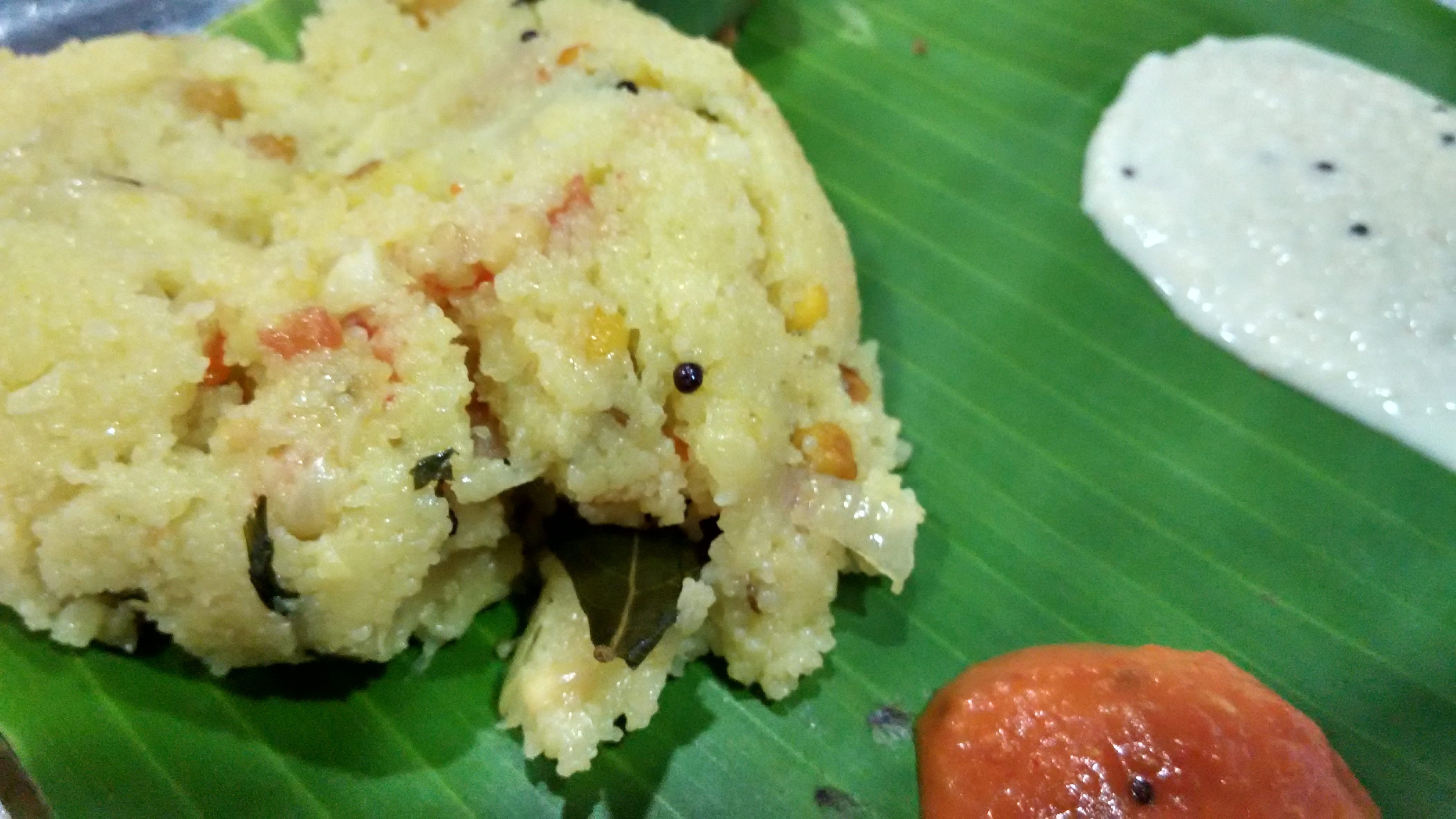 இரவா உப்புமா.